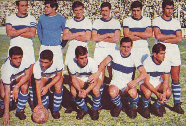 Foto de la formación base del Gimnasia y Esgrima La Plata campeón del Torneo Promocional de 1967.